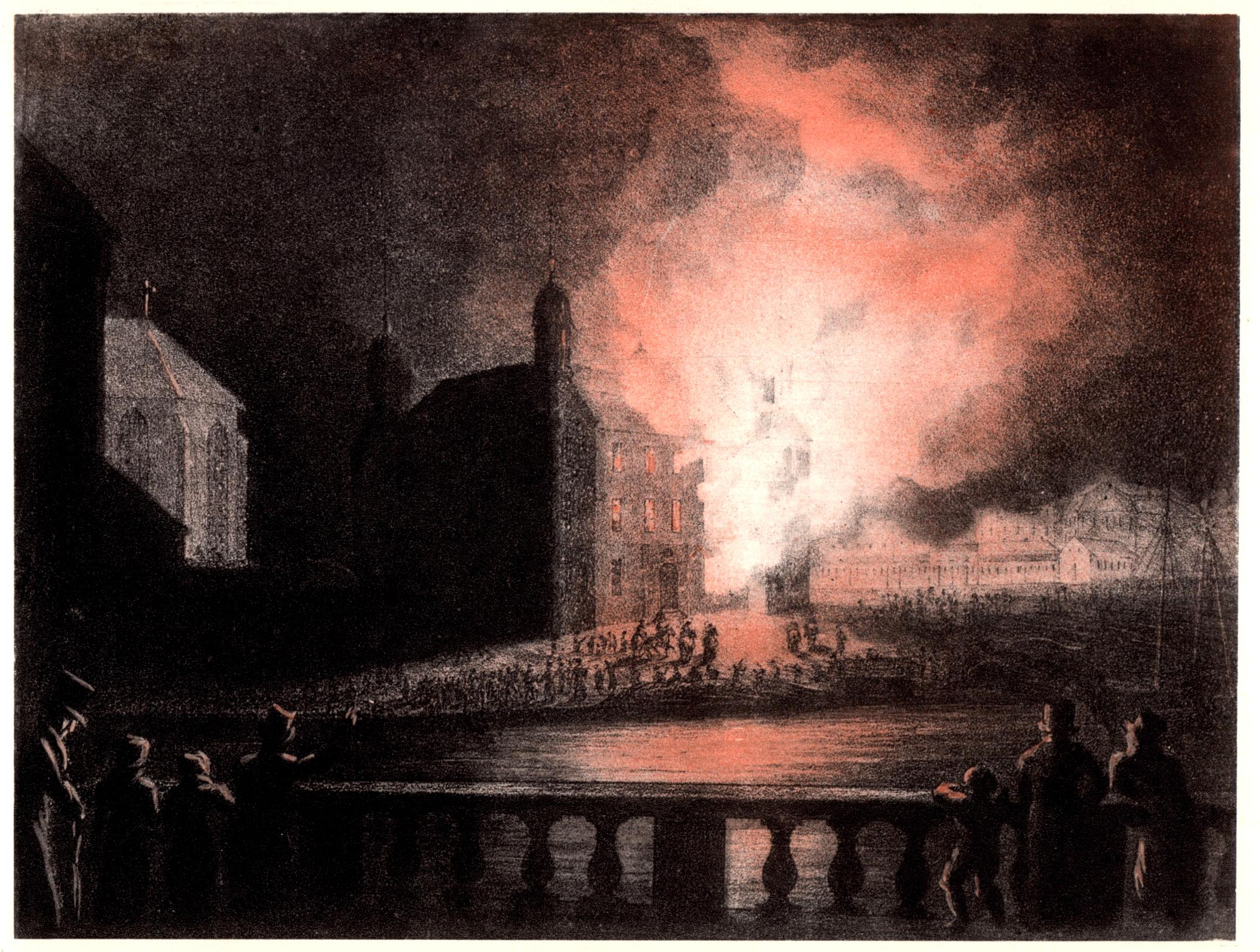 Arsenalsteaterns brand 1825. Färglitografi av C. von Schéele efter teckning av C. S. Graffman. Nationalmuseum.